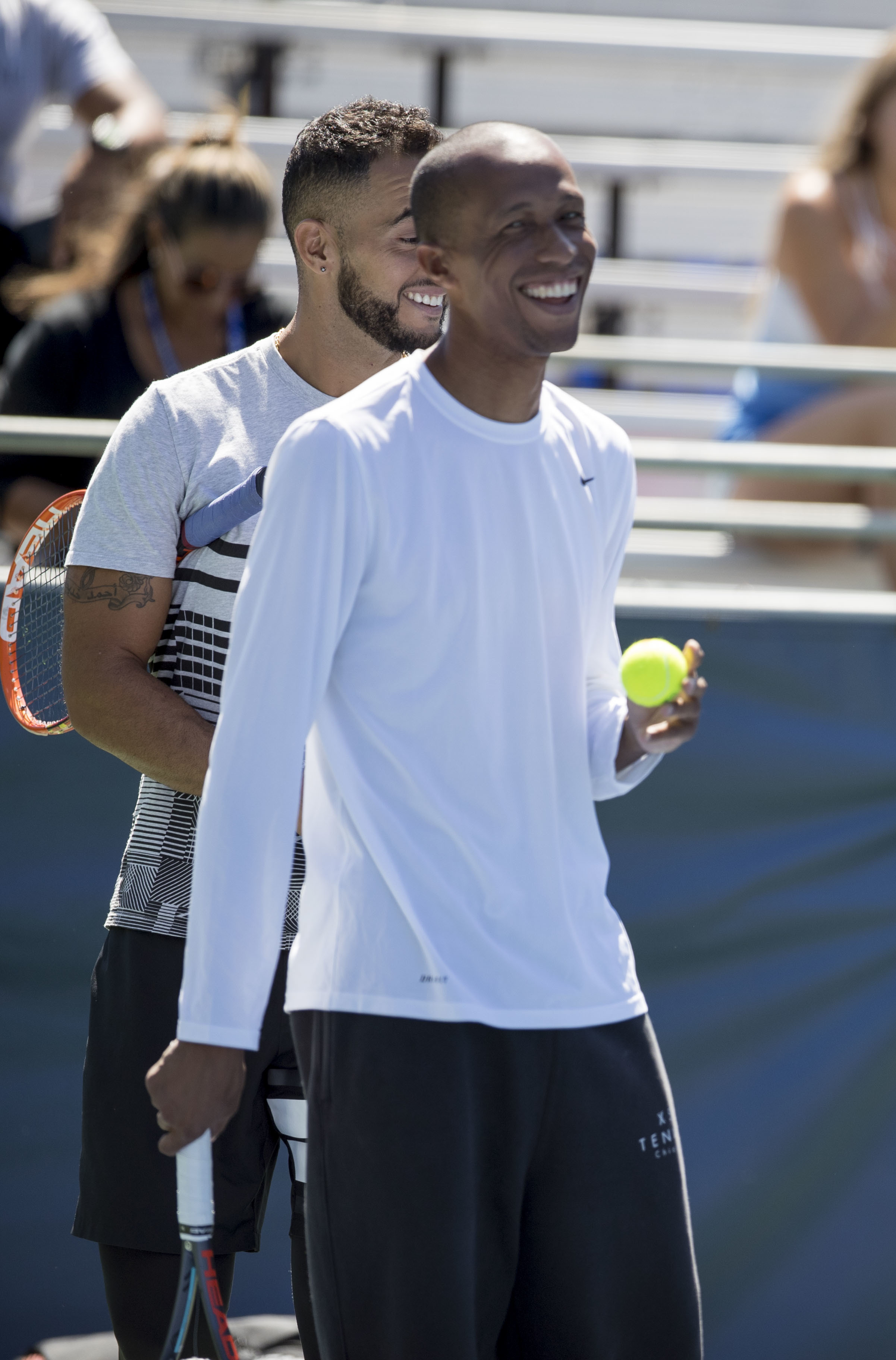 Citi Open Tennis 2017